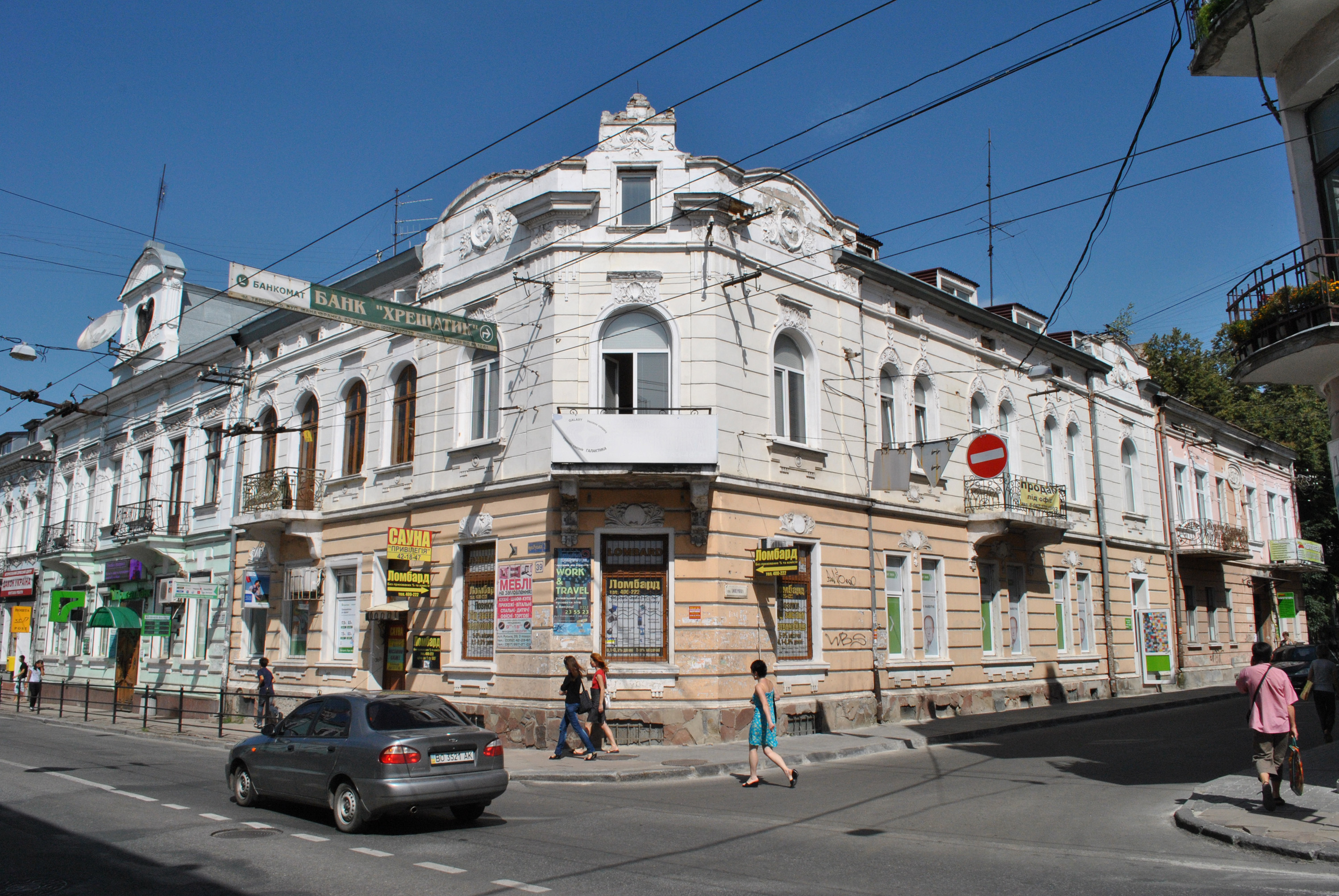 Пам'ятка архітектури місцевого значення: житловий будинок (мурований) на вул. Руській, 39 у Тернополі.